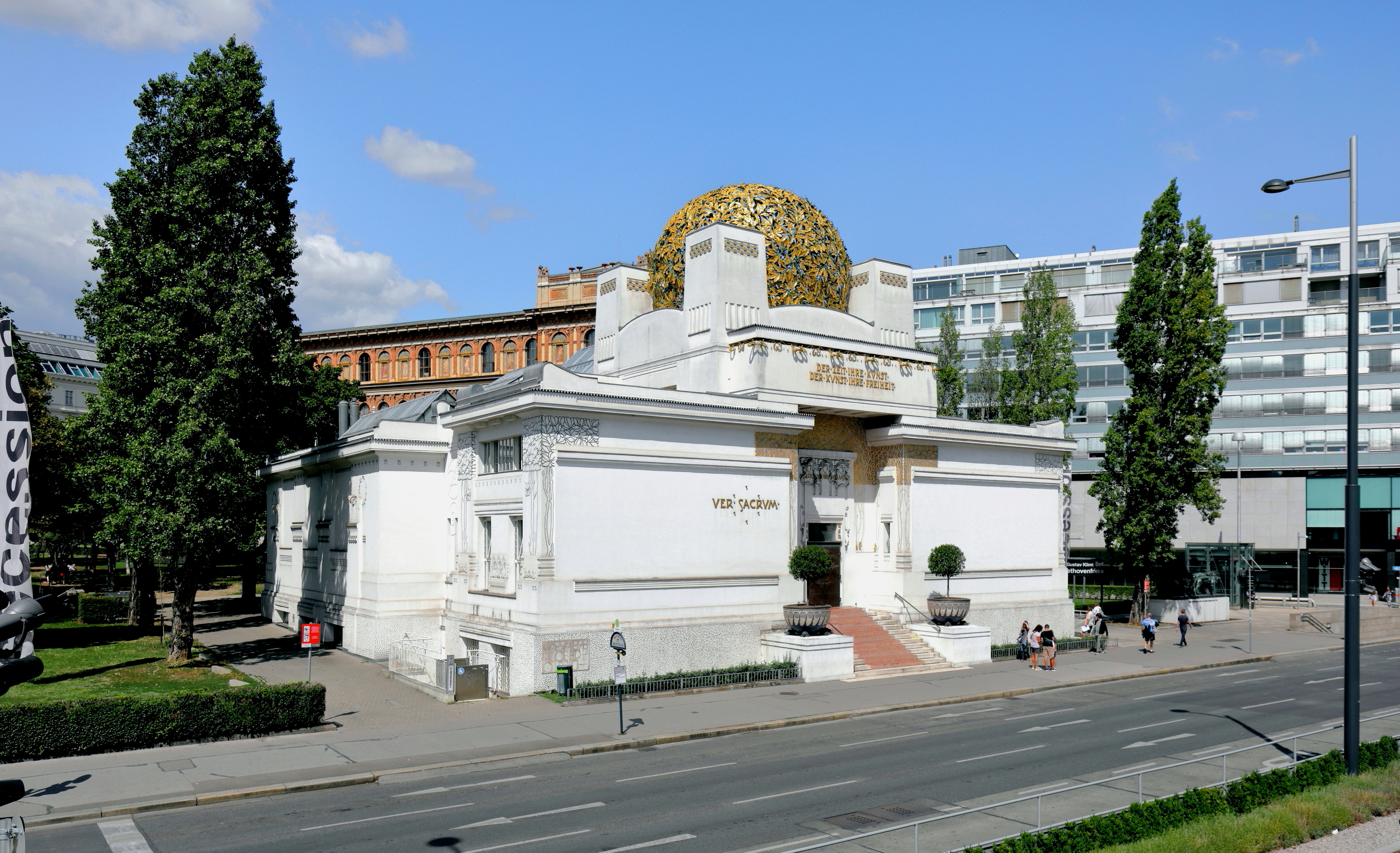 Das Wiener Secessionsgebäude an der Adresse Friedrichstraße 12 im 1. Wiener Gemeindebezirk Innere Stadt.Das Ausstellungsgebäude für zeitgenössische Kunst der Künstlervereinigung „Secession“ wurde nach Plänen von Joseph Maria Olbrich ab 1897 errichtet und am 15. November 1898 eröffnet. Im 2. Weltkrieg durch Bomben und Brand de facto zerstört, wurde es nachher wieder aufgebaut und am 5. Juni 1964 mit der Ausstellung „Wien um 1900" wiedereröffnet.